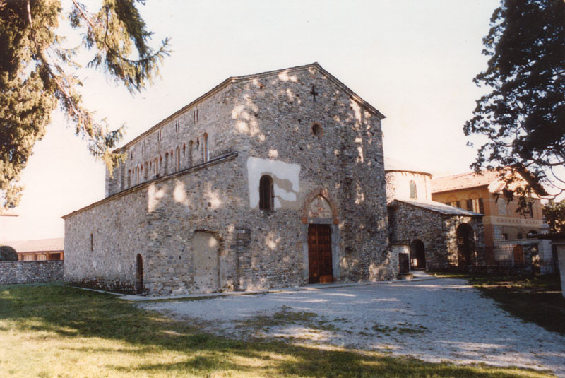 Galliano - Cantù